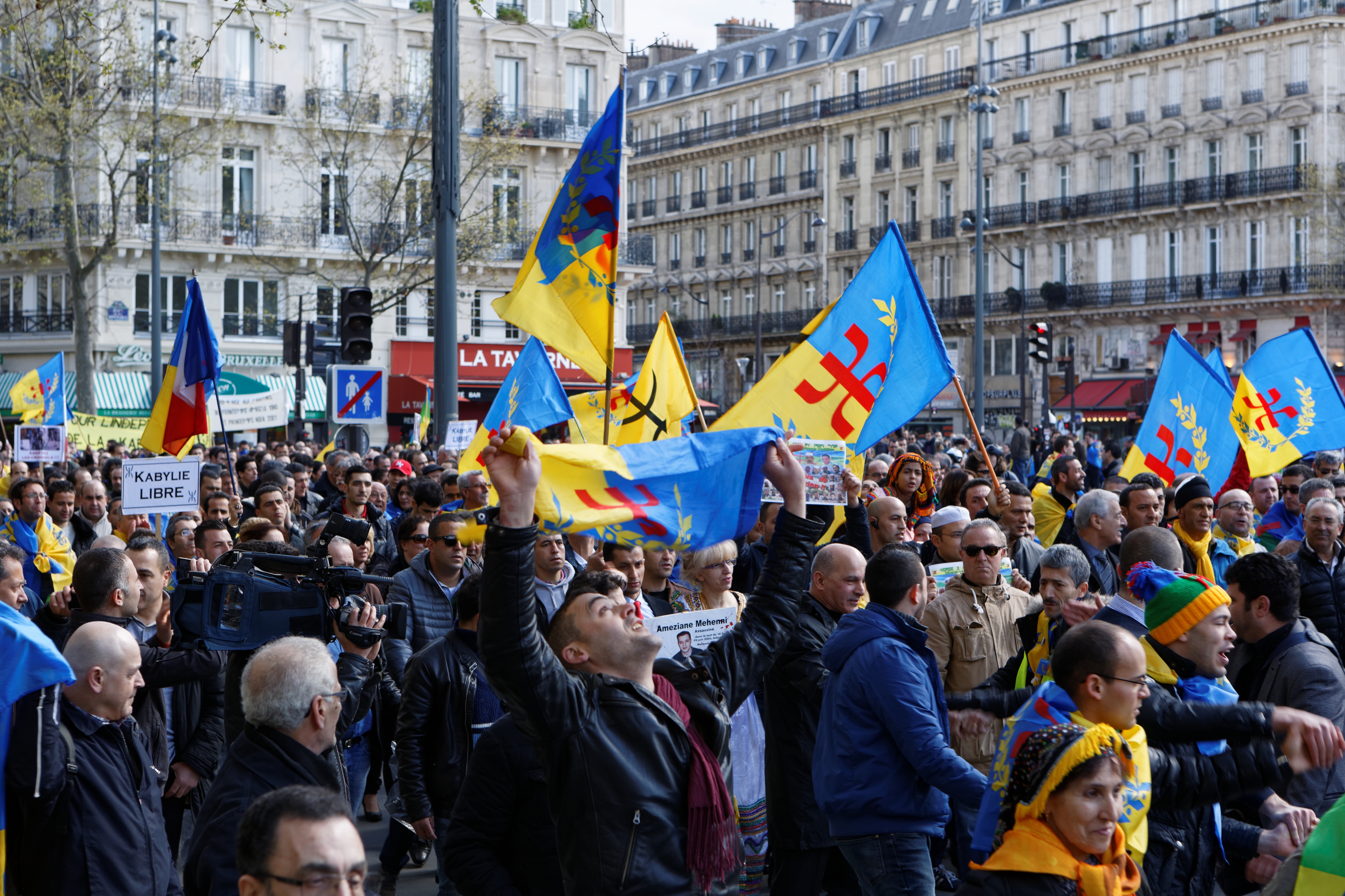 Rassemblement "Nuit Debout" à Paris le 48 mars.